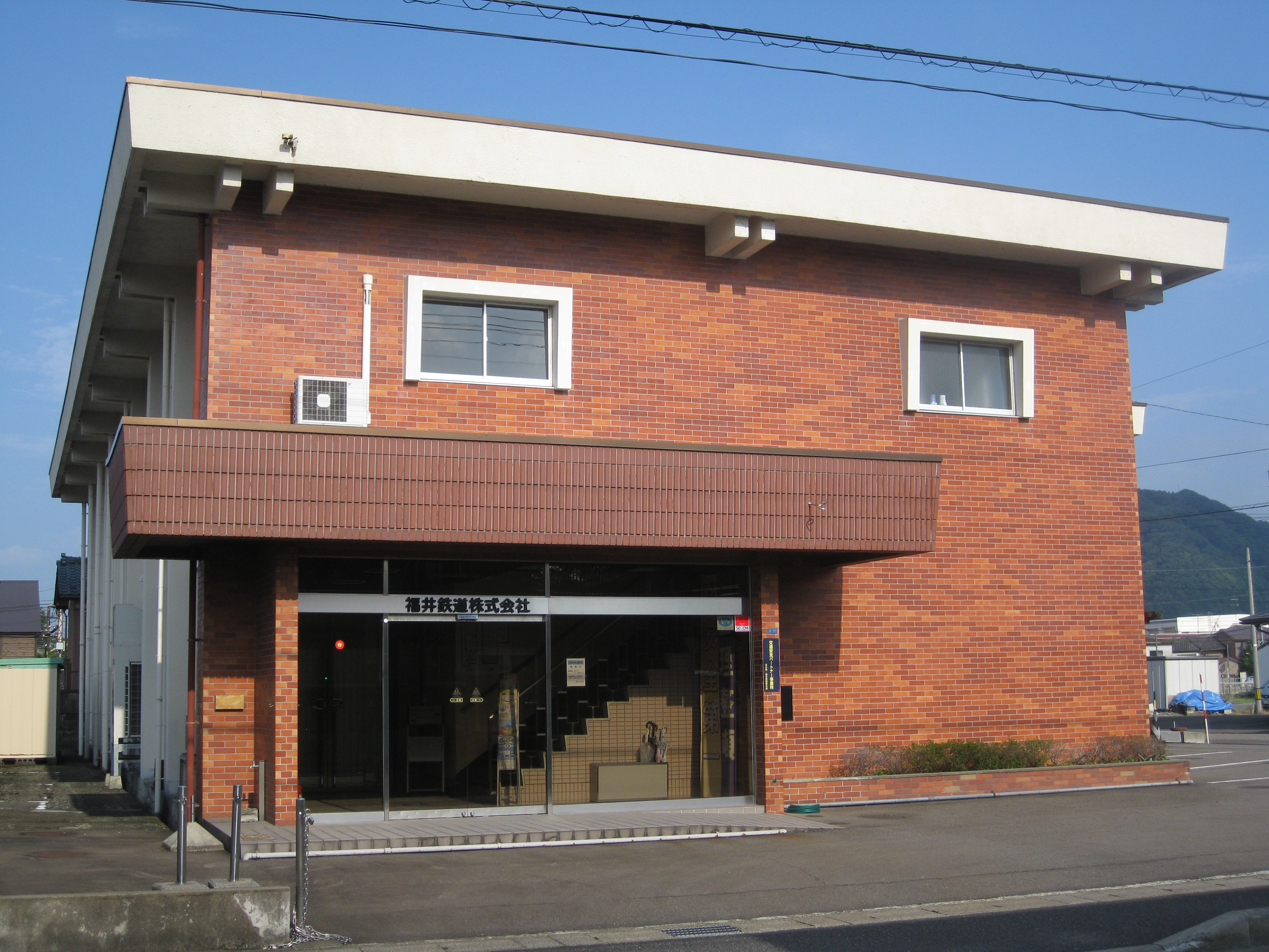 福井鉄道の本社ビル